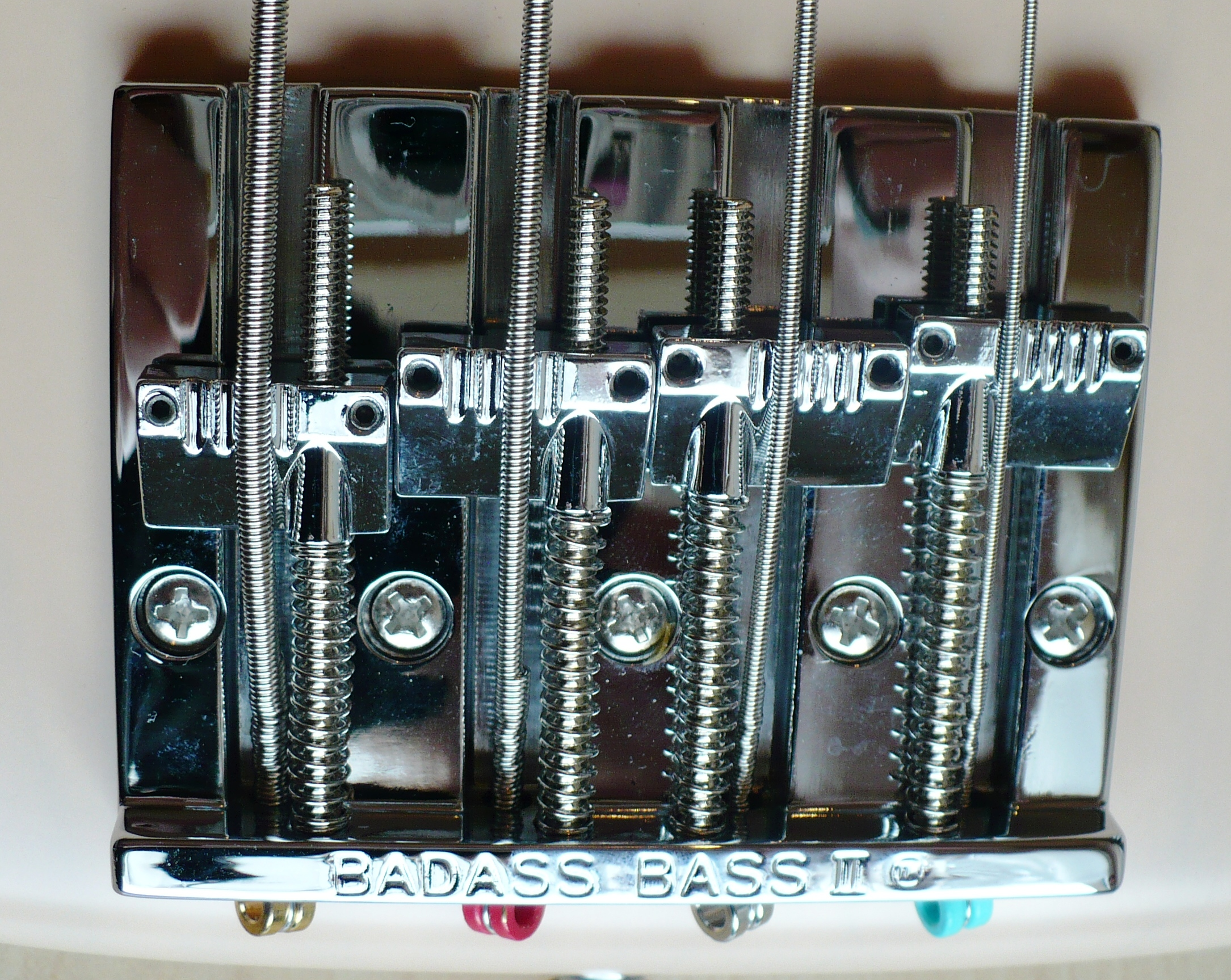 Badass Bass II Brücke an einem Fender Precision Bass von 2010